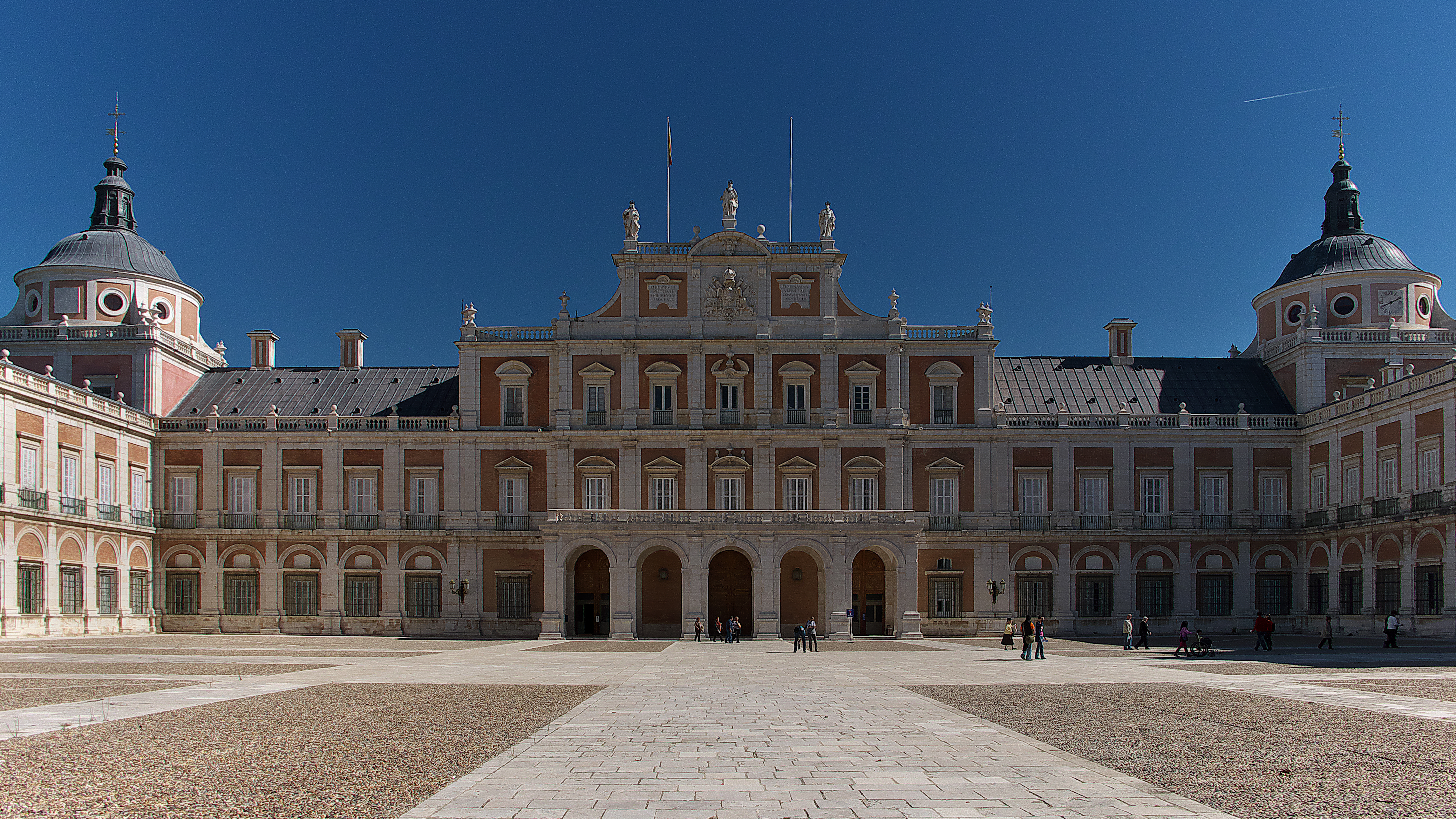 Felipe II con Juan Bautista de Toledo, Jerónimo Gili, (1559) y Juan de Herrera (1575); Felipe IV con Juan Gómez de Mora (1626); Felipe V con Pedro Caro Idrogo (1715) y Leandro Bachelieu (1739); Fernando VI con Giacomo Bonavia (1746) y Carlos III con Francesco Sabatini (1772-1777), etapas constructivas para el logro de un gran palacio.